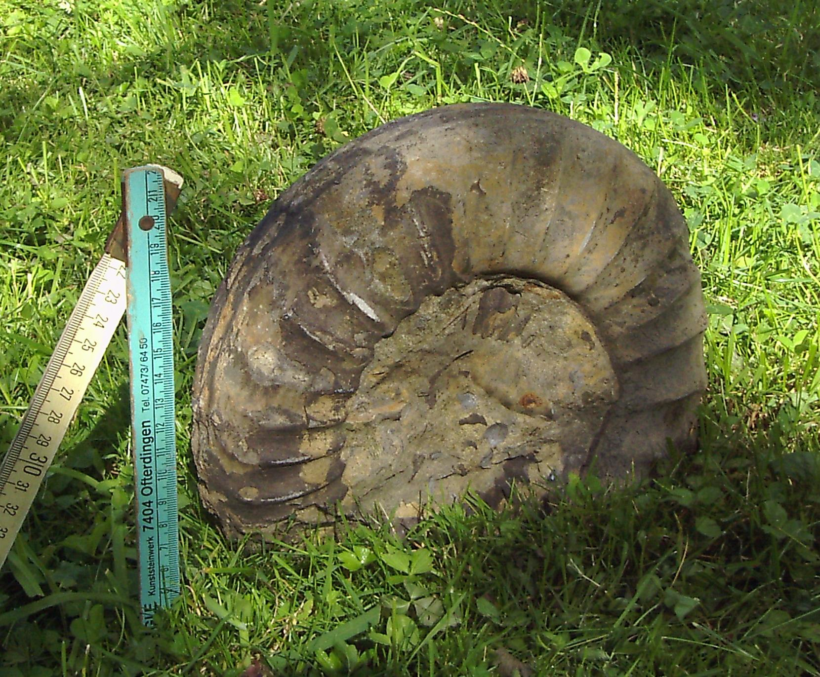 Steinkern von Arietites bucklandi, Leitfossil des Schwarzen Jura alpha 3, aus einer Baugrube in Ofterdingen (Lkr. Tübingen). Funde dieser Art und dieser Größe sind nicht selten.